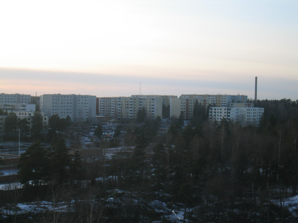 Pihlajisto kuvattuna Pihlajamäen kallioilta